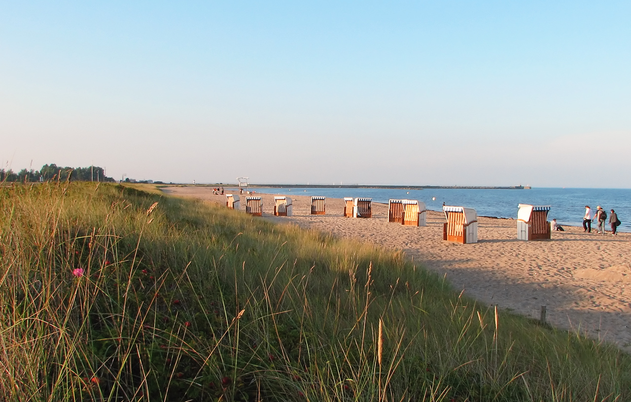 Weidefelder Strand / im Hintergrund sieht man die Mole des Marinestützpunkts Olpenitz